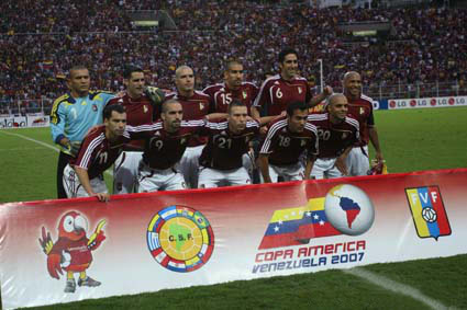 Venezuela - Copa América 2007. Arriba de izquierda a derecha: Renny Vega, Miguel Mea Vitali, José Manuel Rey, Fernando De Ornelas, Alejandro Cichero, Luis Vera. Abajo de izquierda a derecha: Ricardo David Páez, Giancarlo Maldonado, Andrés Rouga, Juan Arango y Héctor González.